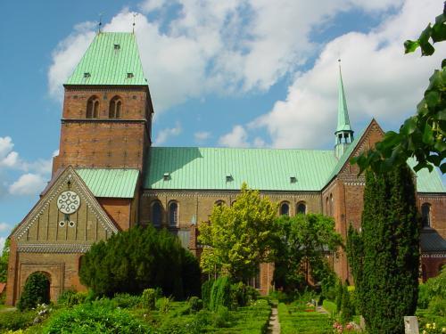 Ratzeburg, Dom